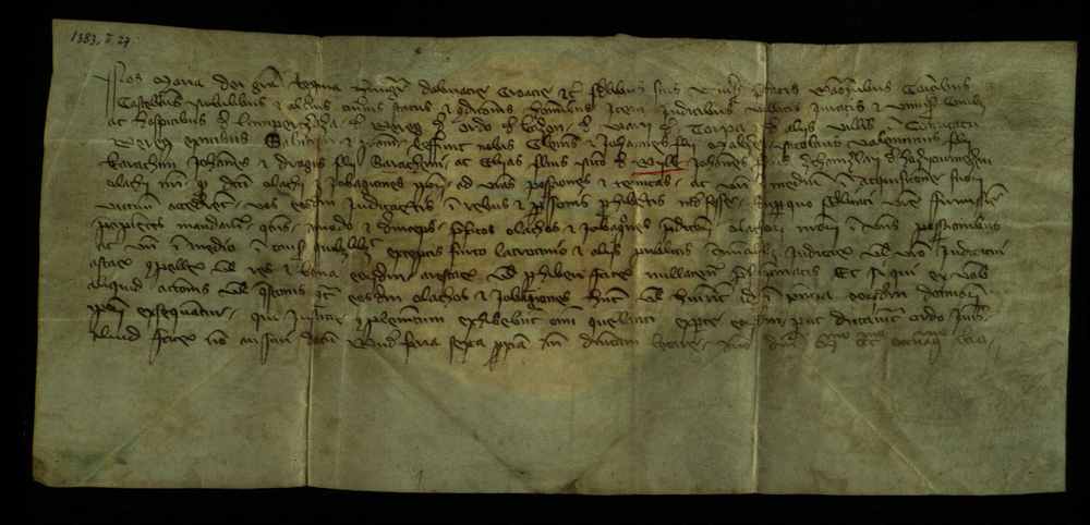 Рукопись, где впервые упоминается о селе Долгое.